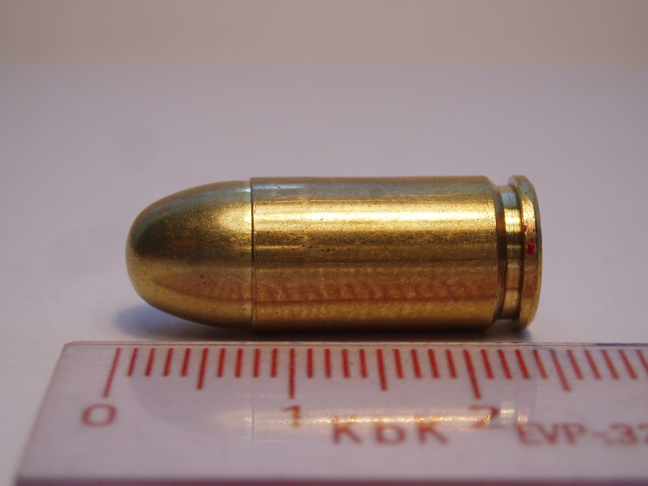 .380 ACP pistol cartrdige. FMJ bullet. Manufacturer: Sellier & Bellot.